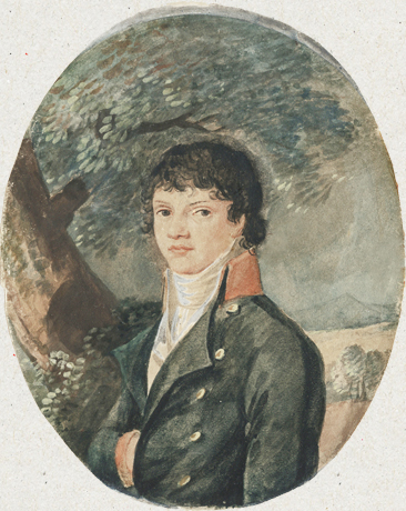 Portrait présumé d'Aimé Picquet du Boisguy (1776-1839)